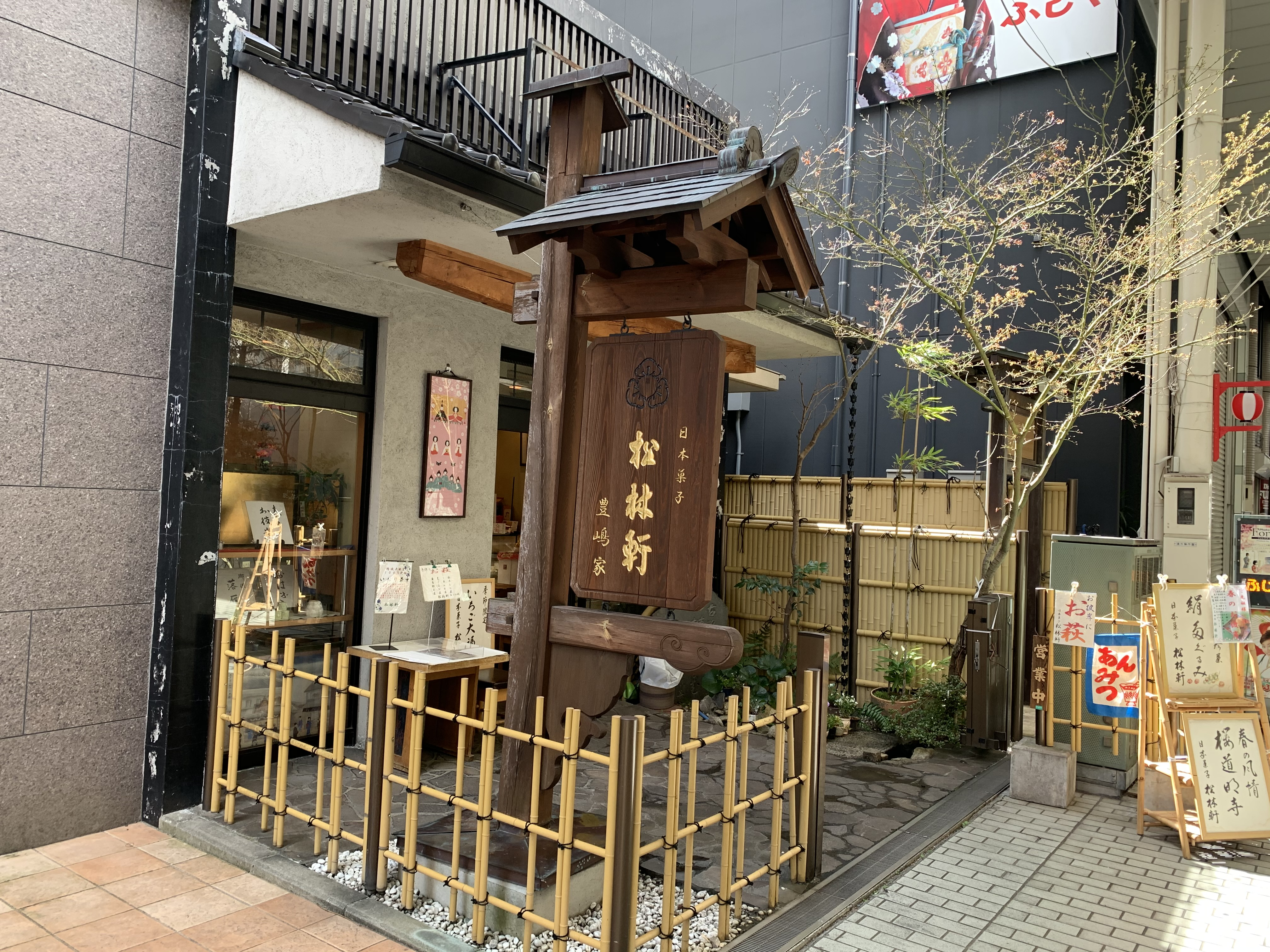 甲府会館跡地で営業を続けている松林軒